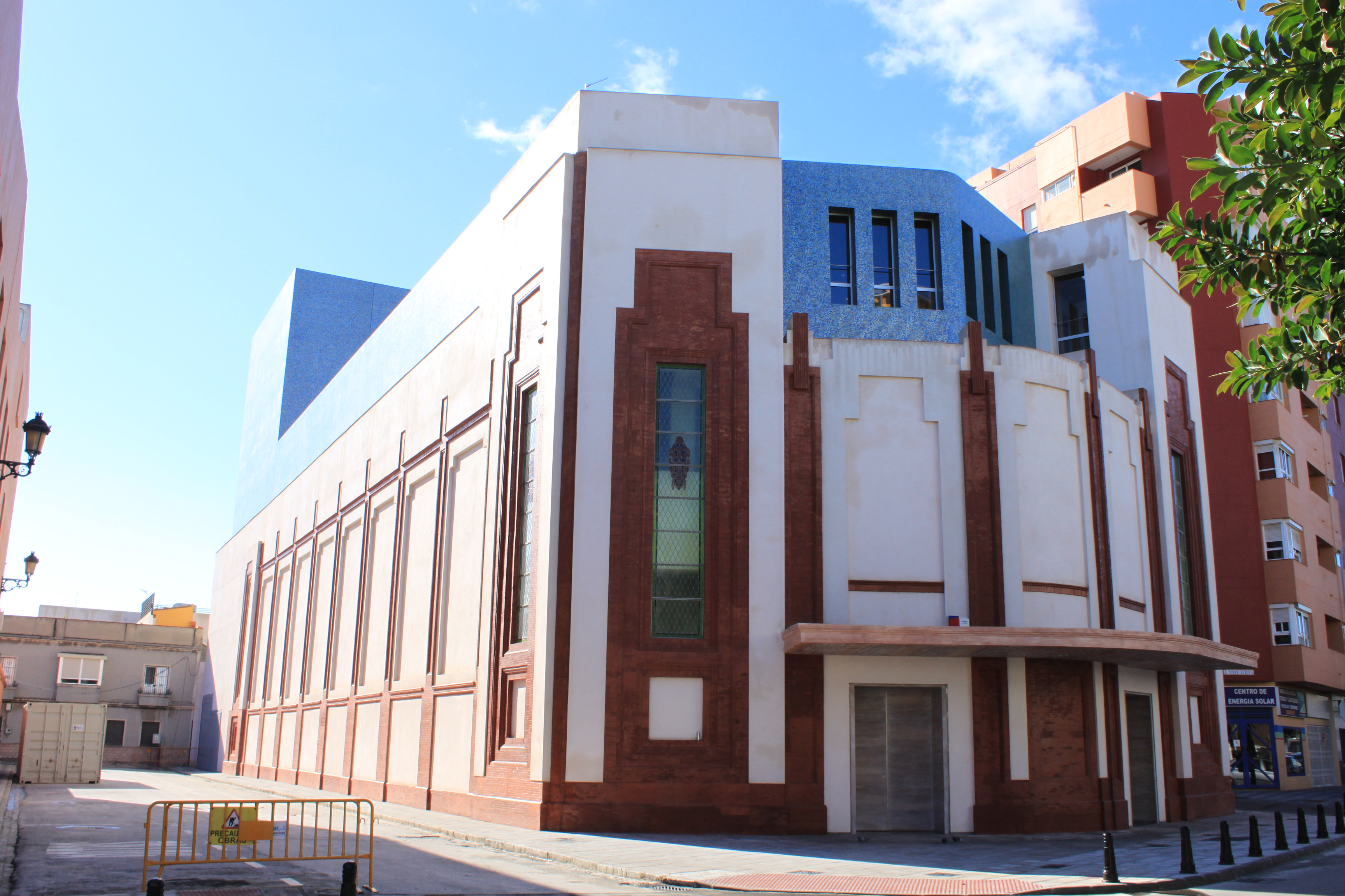 Teatro Florida de Algeciras tras su restauración